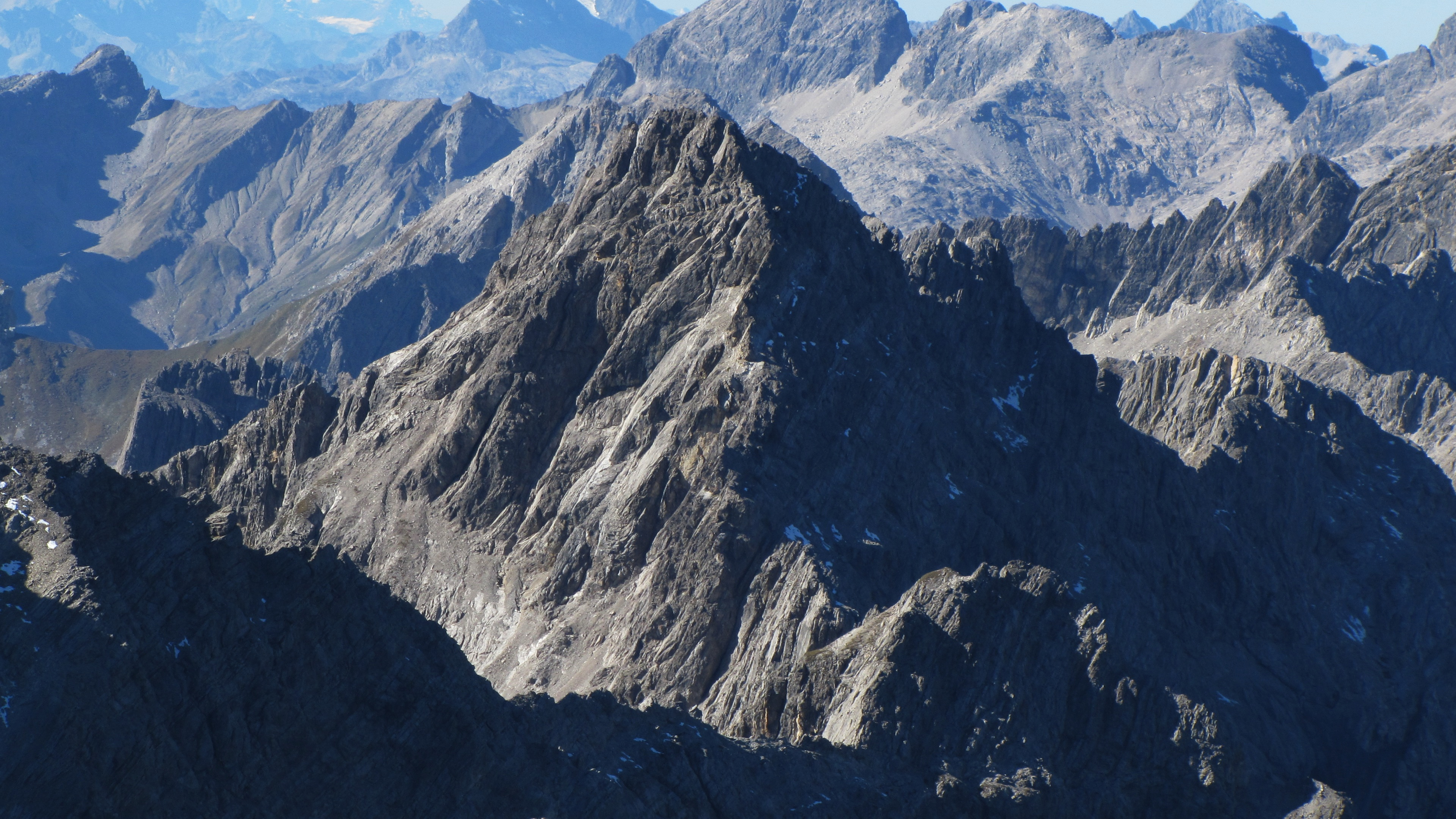 Blick von der Urbeleskarspitze (2632 m) nach Südwesten zur Kreuzkarspitze (2587 m).